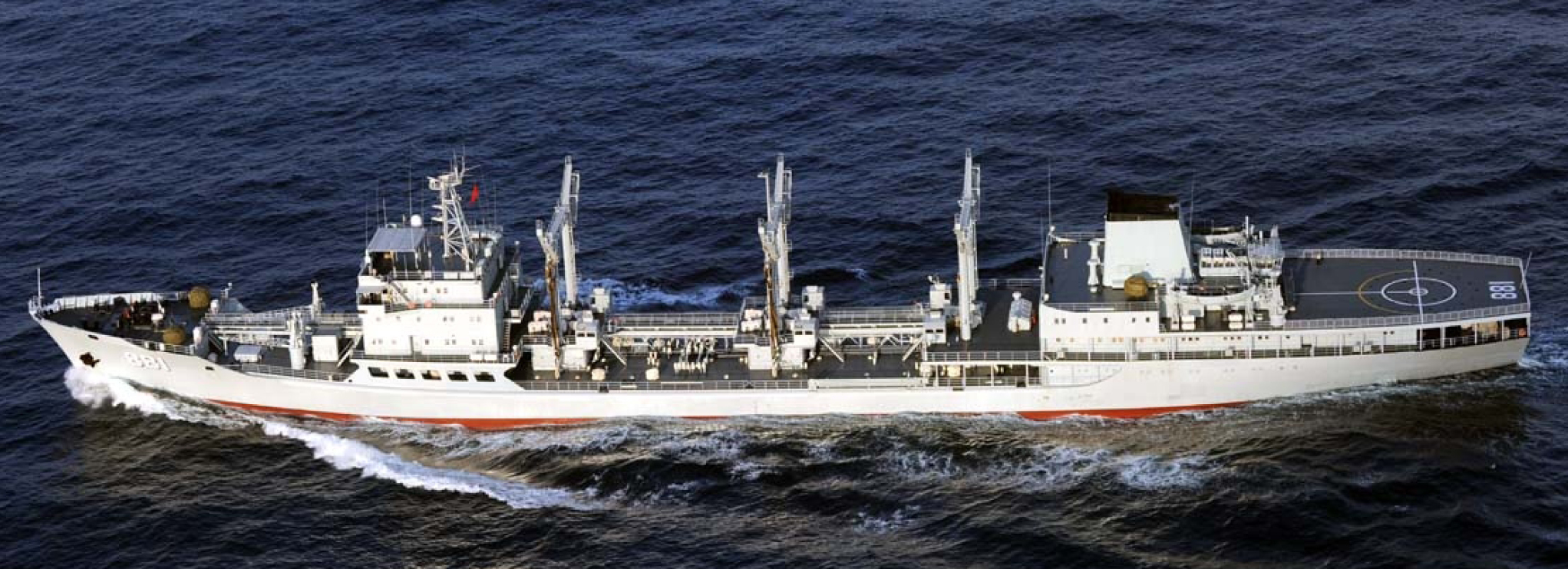 ５月２７日（月）午後１時頃、海上自衛隊第１２護衛隊「せんだい」（呉）及び第５航空群所属「Ｐ－３Ｃ」（那覇）が、宮古島の北東約１１０ｋｍの海域を東シナ海から太平洋に向けて南東進する中国海軍ルフ級駆逐艦１隻、ジャンカイⅡ級フリゲート１隻及びフーチン級補給艦１隻の合計３隻を確認しました。